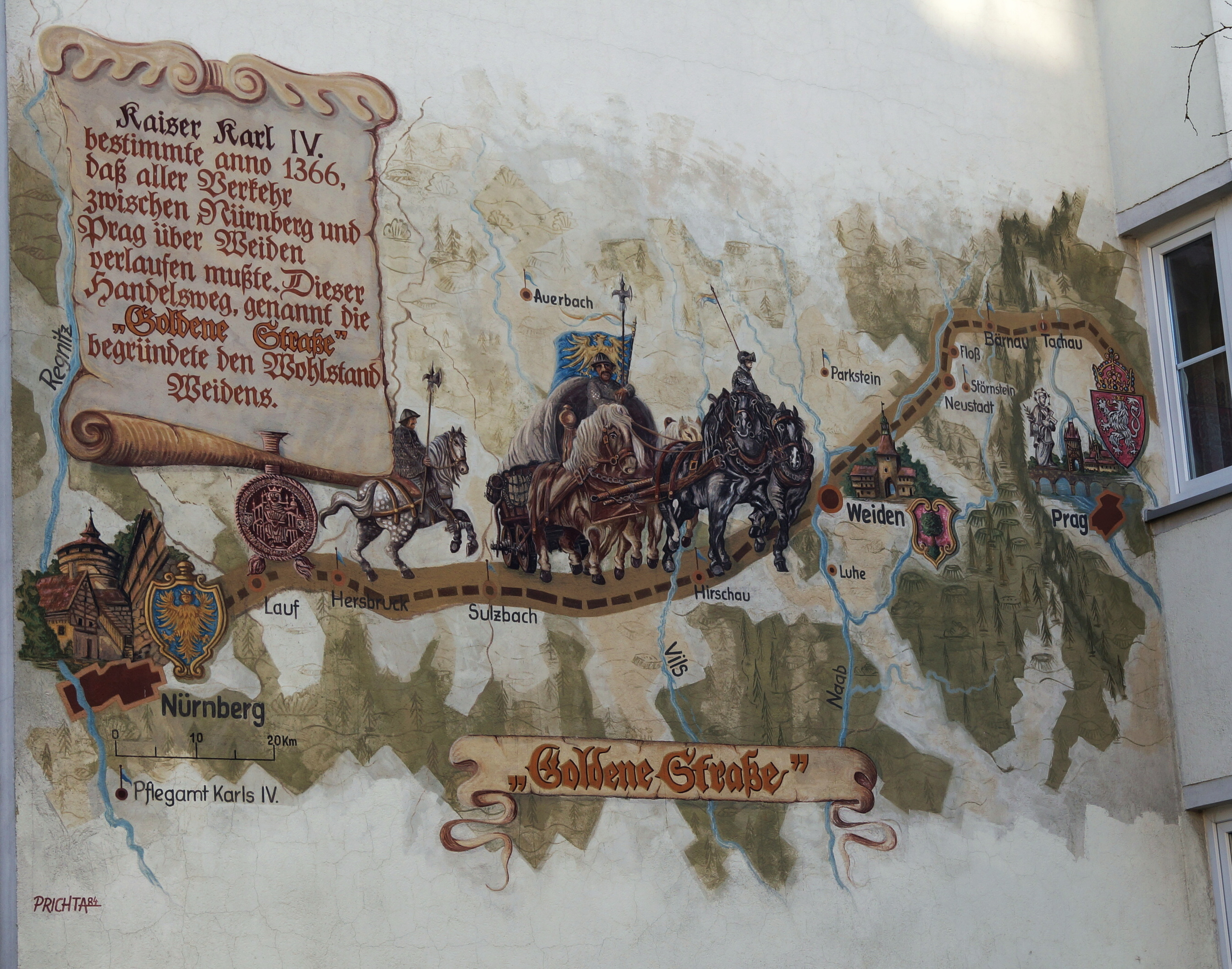 Obraz Goldene Strasse (Via Carolina) na stěně domu ve Weidenu, Königstrasse 15.